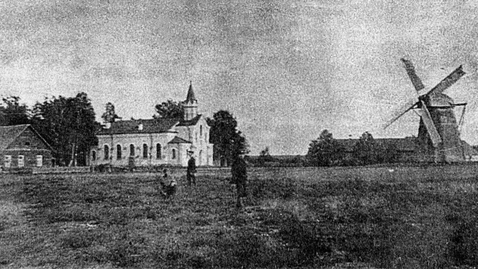 Деревня Кузёмкино.